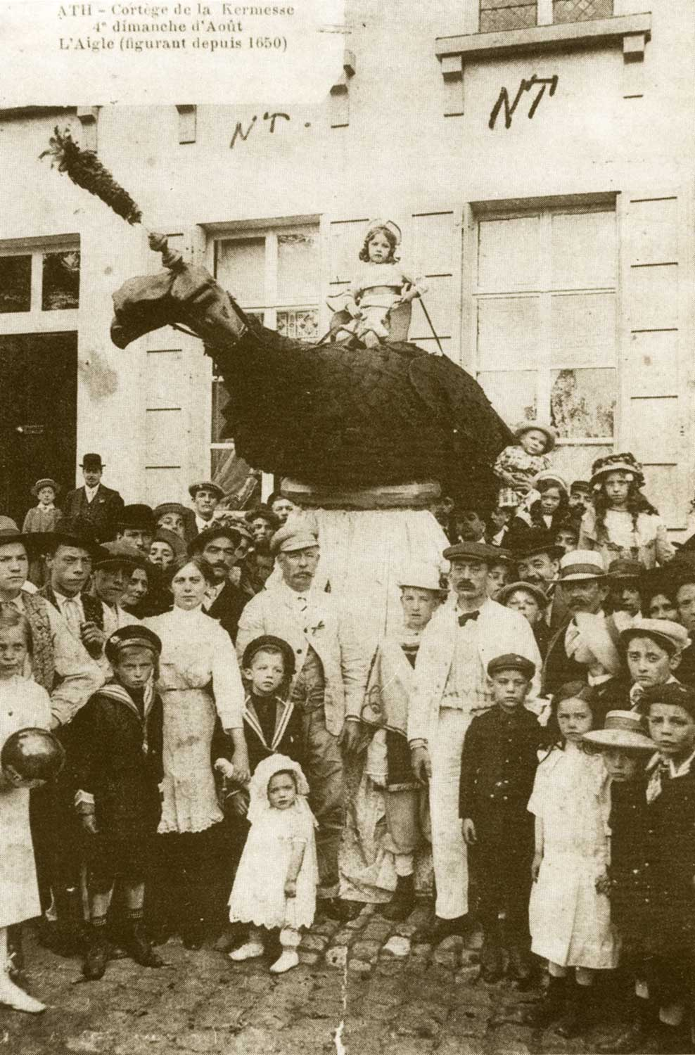 L'aigle à deux têtes, géant d'Ath vers 1900